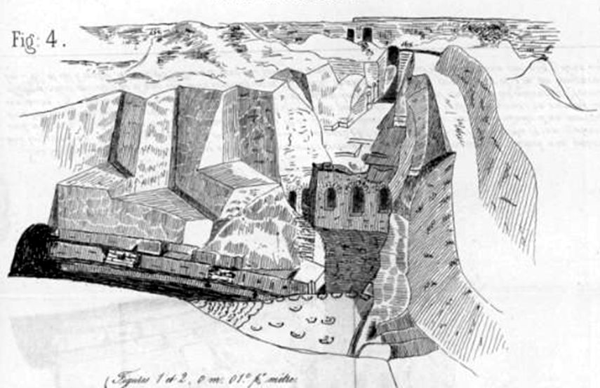 Arènes de Senlis, état du déblaiement au 31 décembre 1865, vue cavalière.